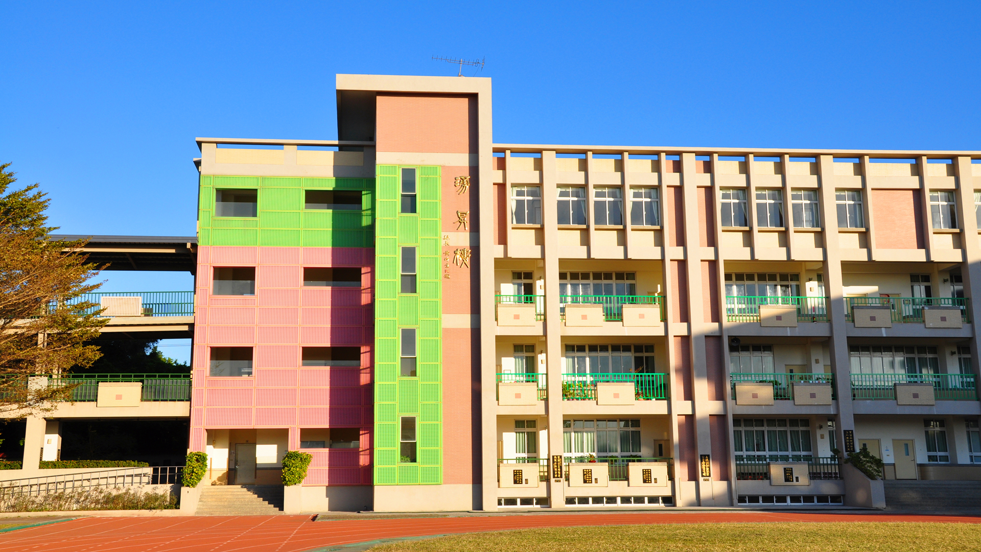 龍泉國小於2007年十一月老舊危險校舍整建新教學大樓-湧昇樓。